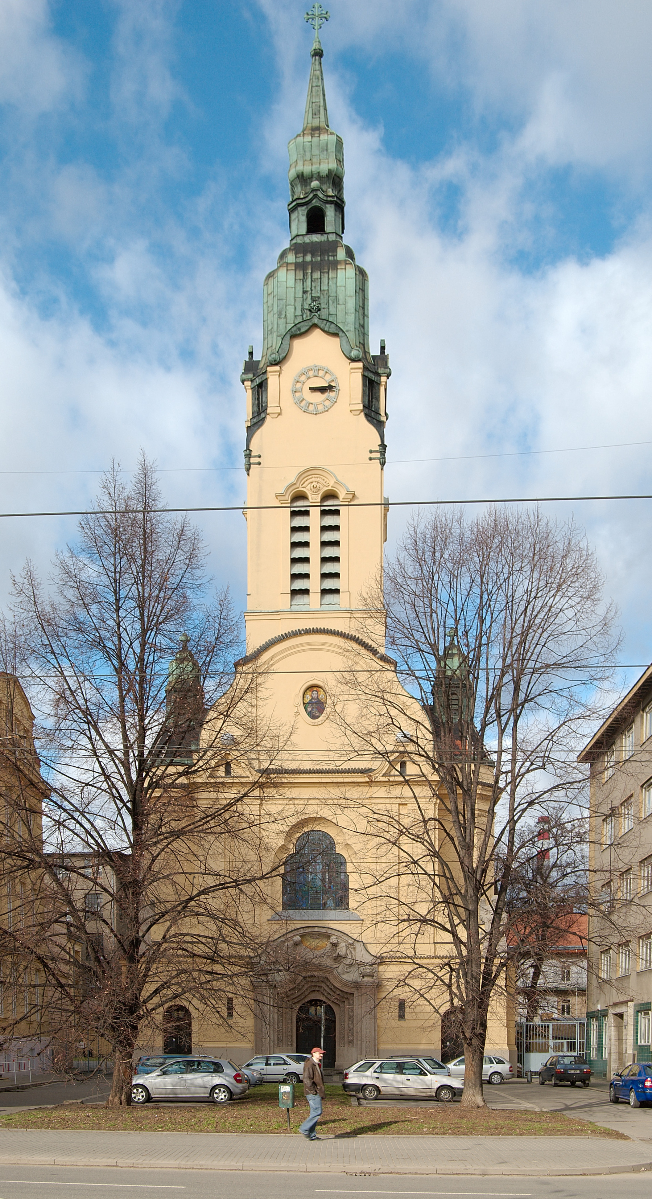 Secesní kostel Neposkvrněného početí P. Marie v Brně na Křenové ulici